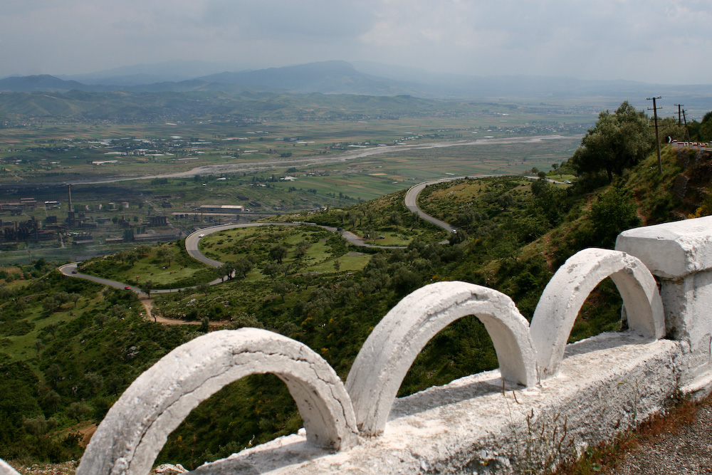 A serpentine in Albania